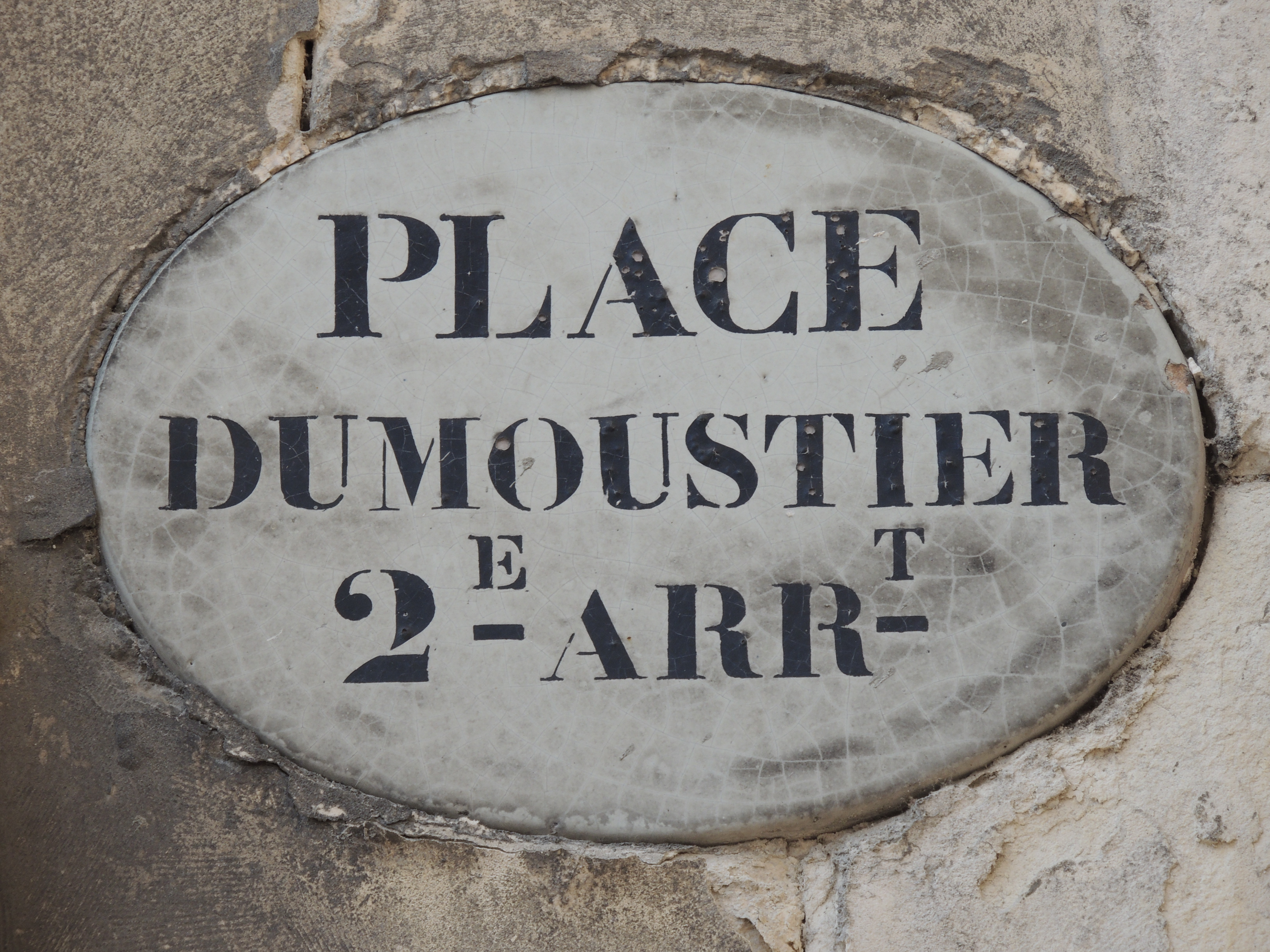 Ancienne plaque en émail sur la place Dumoustier (Nantes)